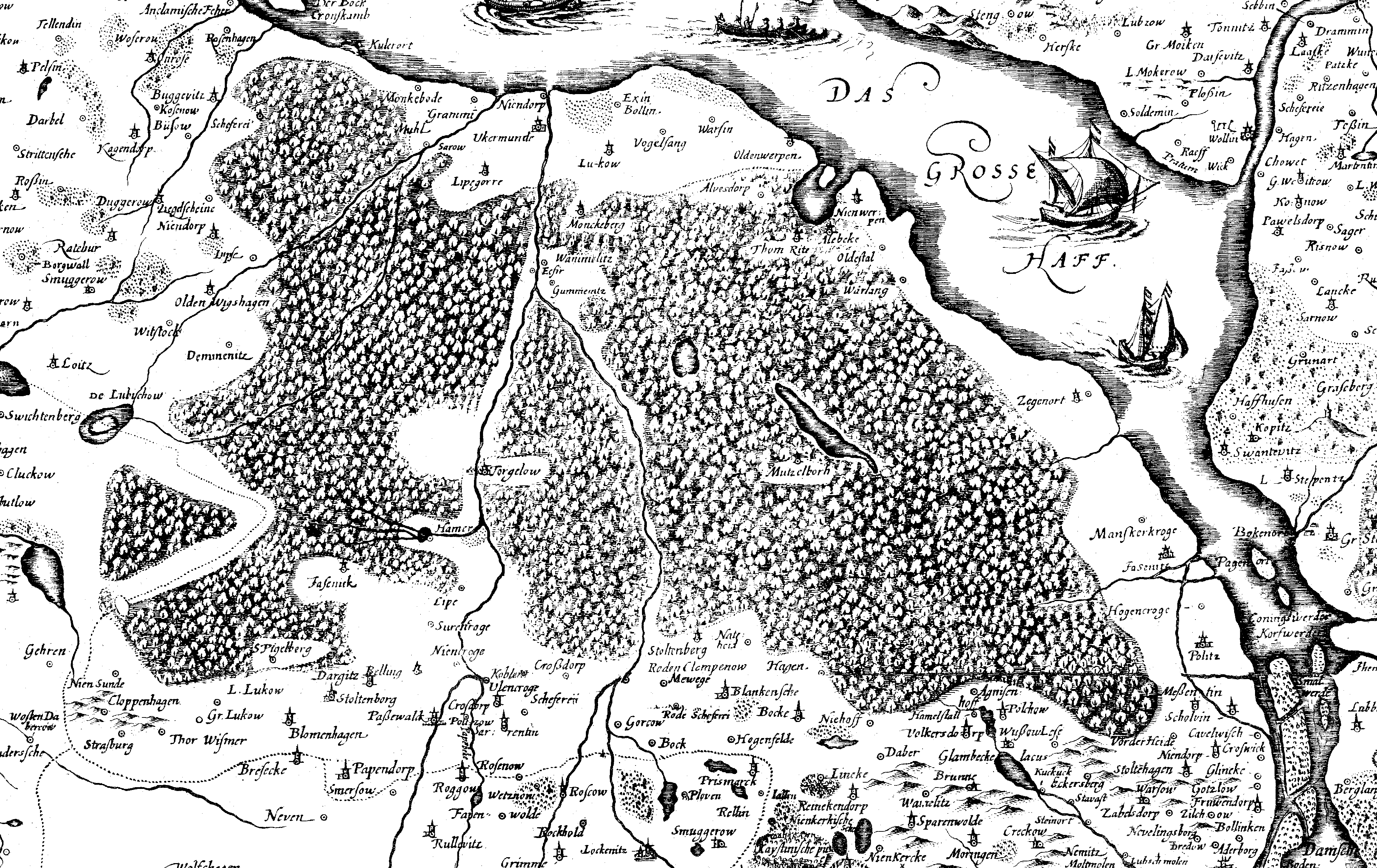 Ueckermünder Heide (zwischen 1614 und 1617)